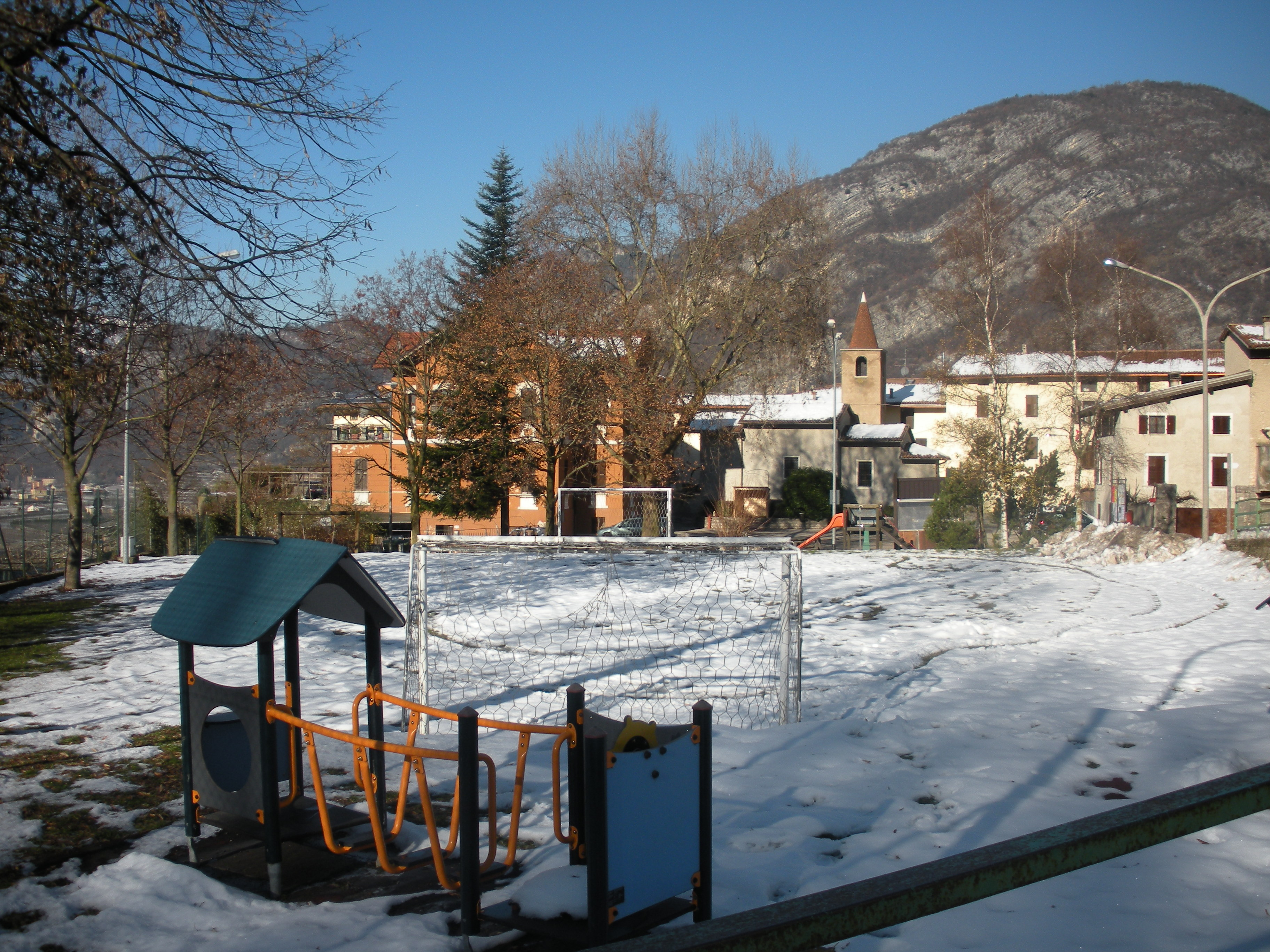 Si può vedere il parcogiochi con la neve, la piazza, la chiesa e varie case.